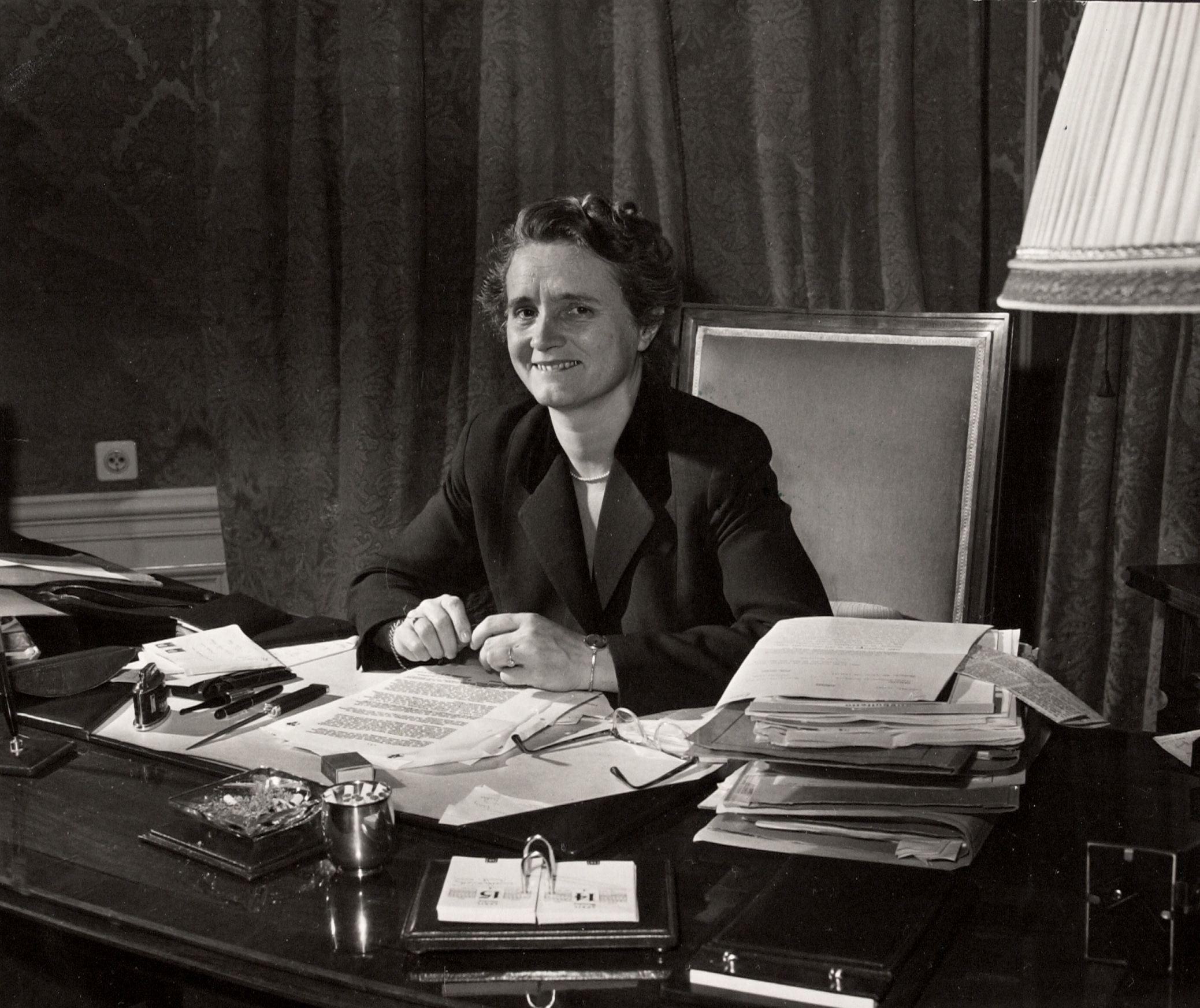 Portret van Marga Klompé, minister van Maatschappelijk Werk in het Derde Kabinet-Drees en het Tweede kabinet-Beel, aan haar bureau. 11 februari 1958.